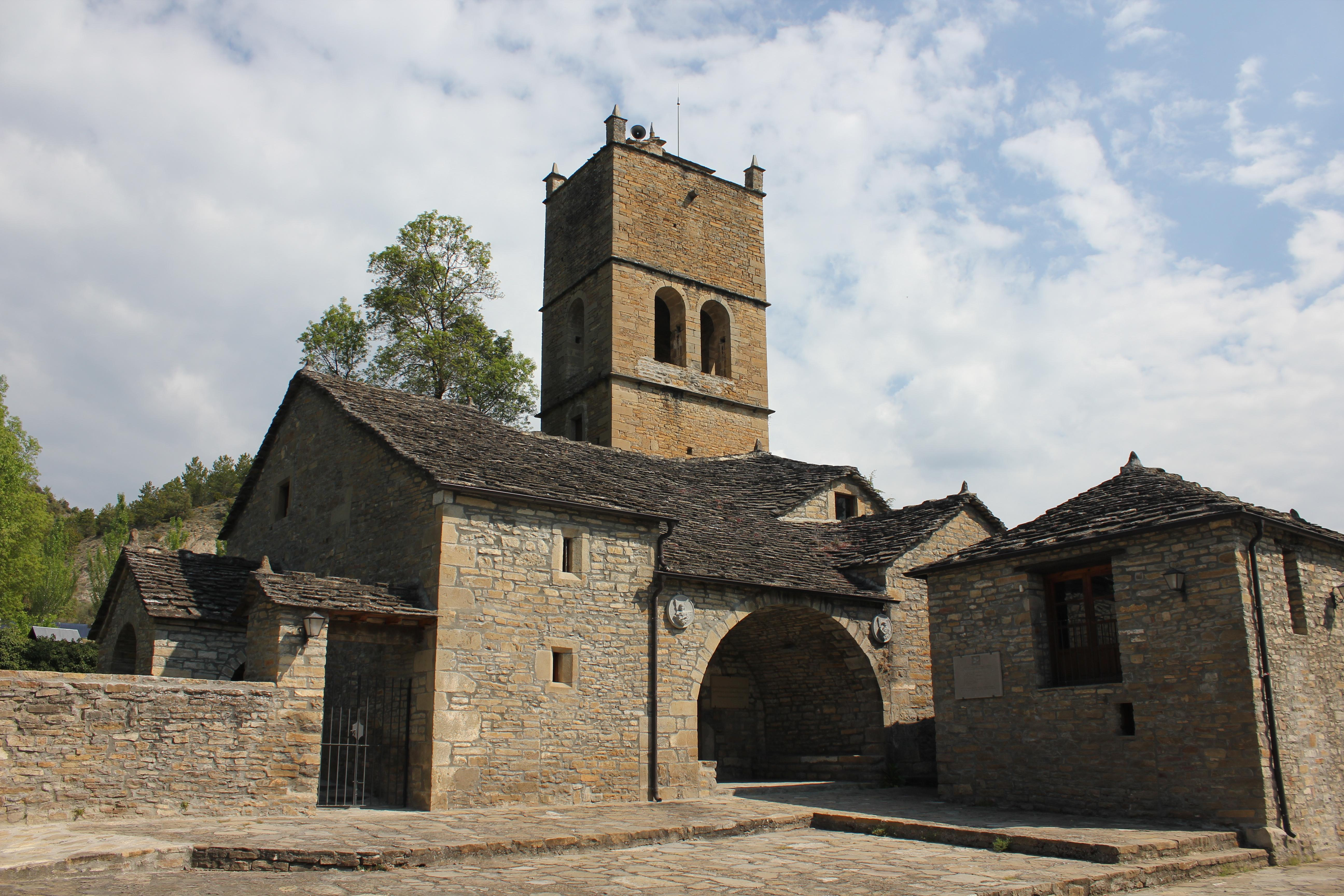 Aragonés: Moriello de Tou